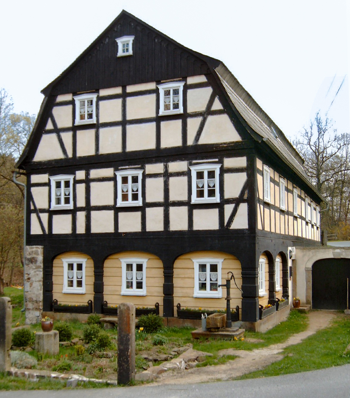 Schirgiswalde: Umgebindehaus, Kapplermühle an der Kieferbergstraße